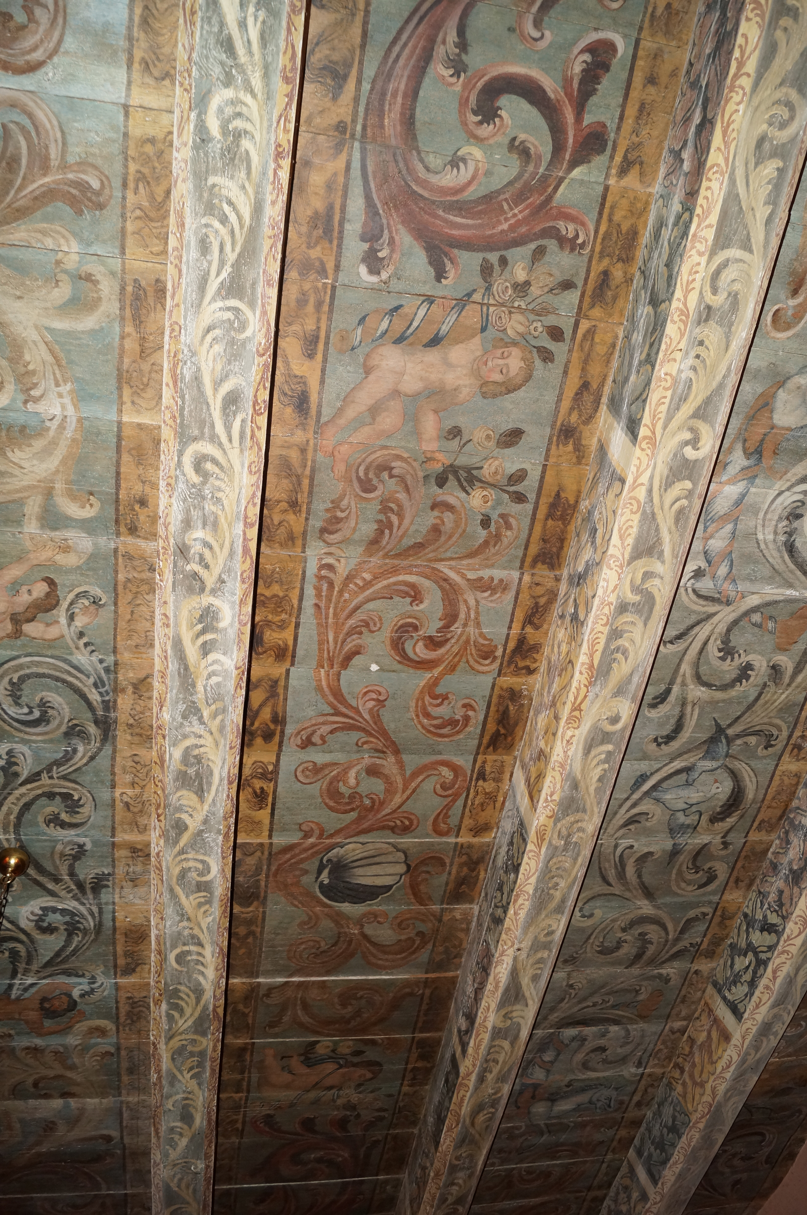 Nowa Wieś Szlachecka - dwór Tyzenhausów, następnie Czapskich z XVI w., rozbudowywany: w XVII w. na parterowy z narożnymi alkierzami, w XVIII w. o skrzydła boczne. Stropy polichromowane fragment (zabytek nr rejestr. A/525)